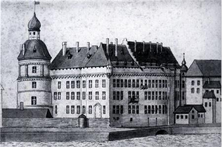 Stadtschloss vom Westen, Bauzustand frühes 18. Jh.. Stadtmuseum Düsseldorf